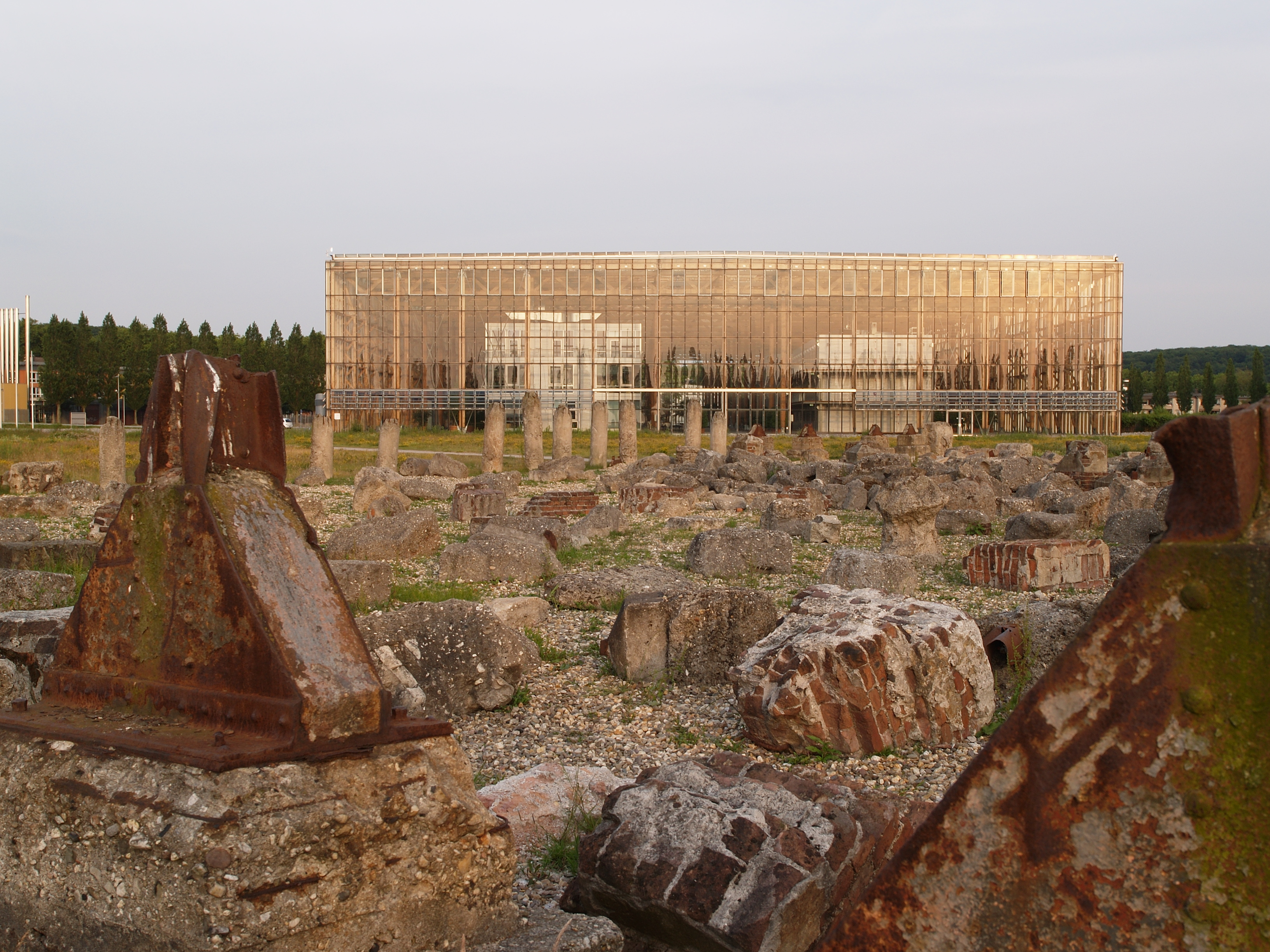 Stelenfeld aus Betontrümmern der Zeche Mont Cenis, von Herman Prigann, nördlich der Akademie Mont-Cenis in Herne